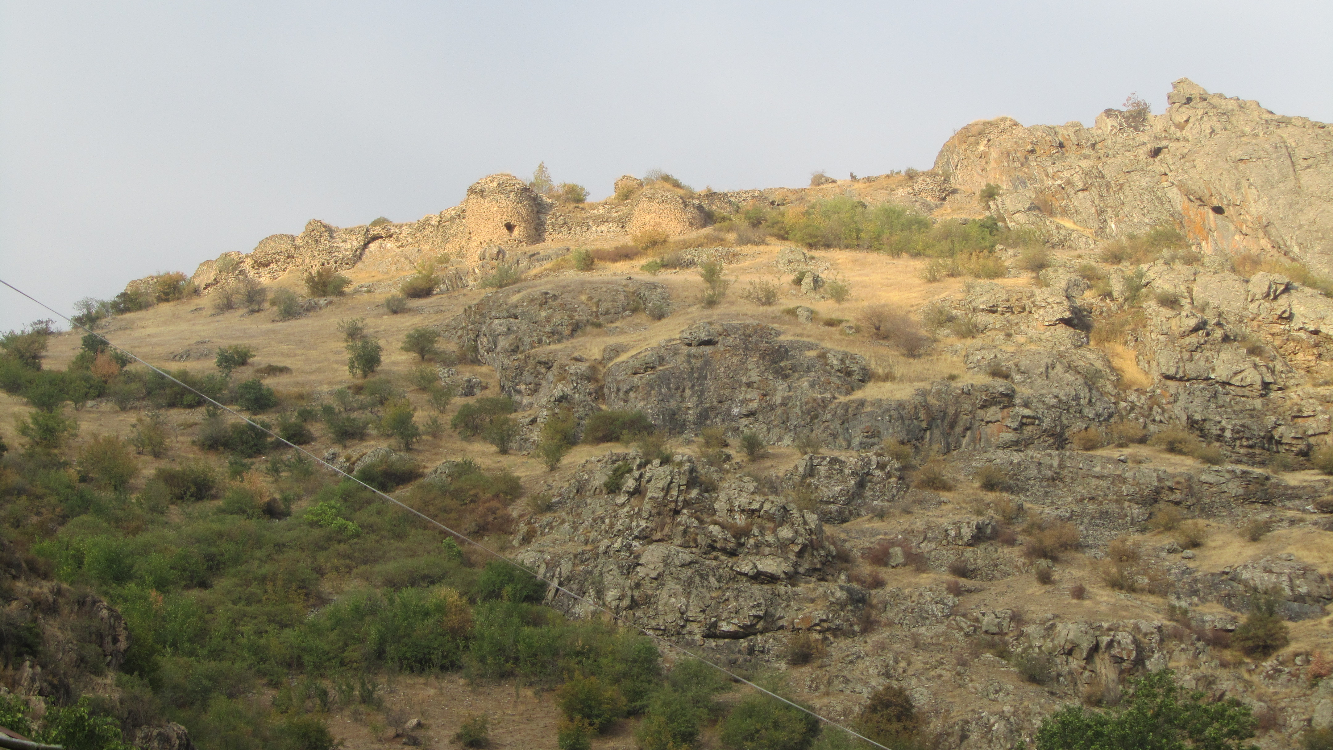 Ամրոց Բաղաբերդ (Դավիթ Բեկի բերդ) - Անդոկավան - քաղաքից ամ, Քաջա­րան տանող մայրուղուց ձախ, Ողջի գետի և նրա ձախ վտակ Գիրաթաղ գետակի միջև, բար­ձունքի վրա - Սյունիքի նշանավոր ամրոցներից էր, կիսավեր 13.1/1